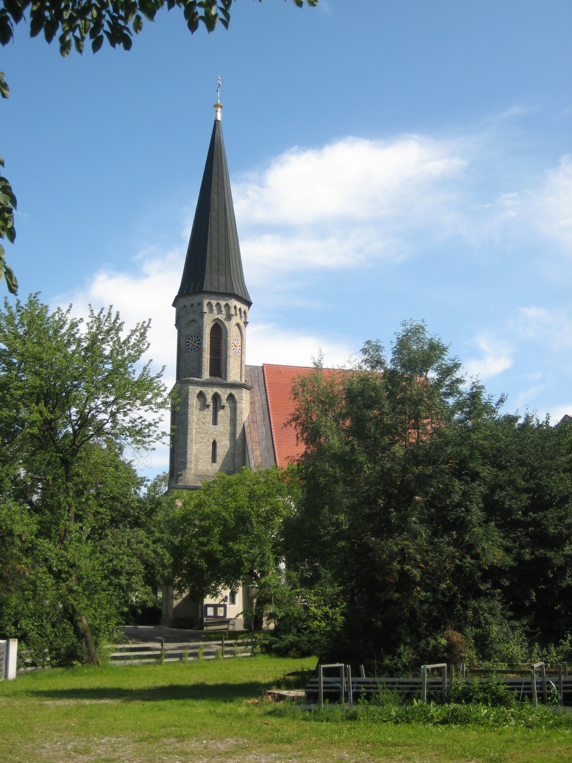 Kath. Pfarrkirche hl. Blasius, 14 Nothelfer und ehem. Friedhofsfläche